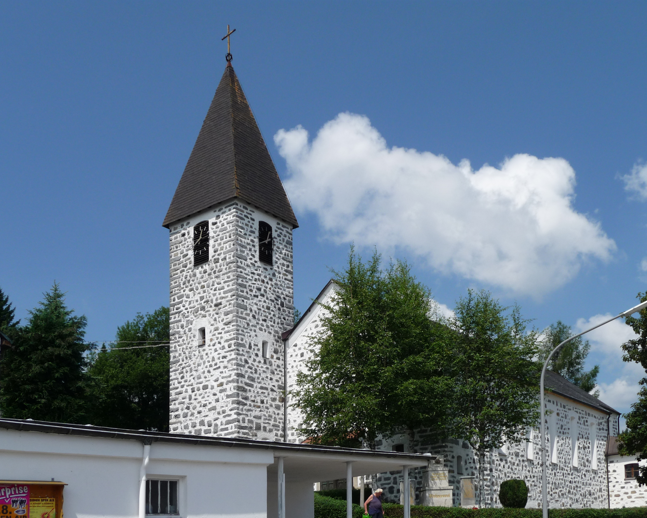 Die Pfarrkirche St. Karl Borromäus in Philippsreut